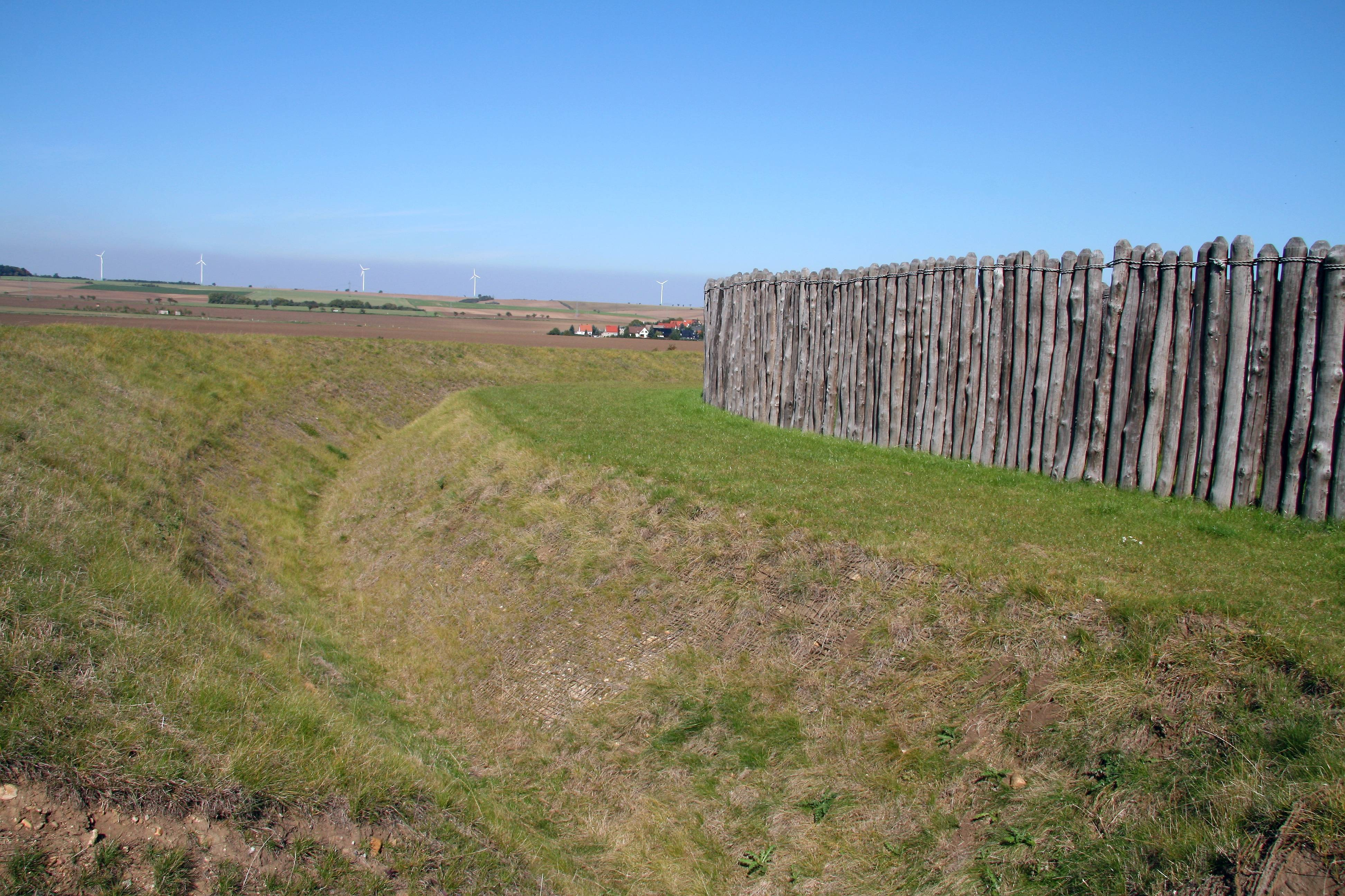 Goseck. Sonnenobservatorium. Ringgraben an der Süd-West-Seite.